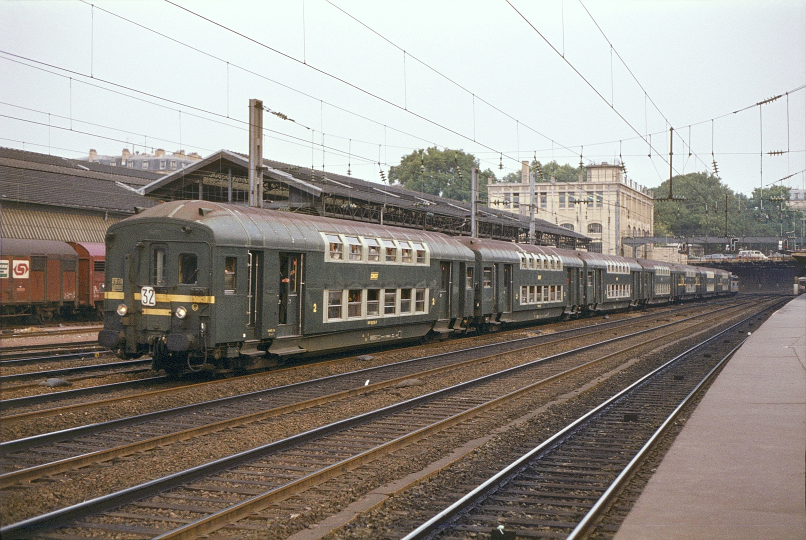 Un train de banlieue composé de voitures à deux niveaux ex-Etat, passe la gare de Pont-Cardinet en direction d'Argenteuil.